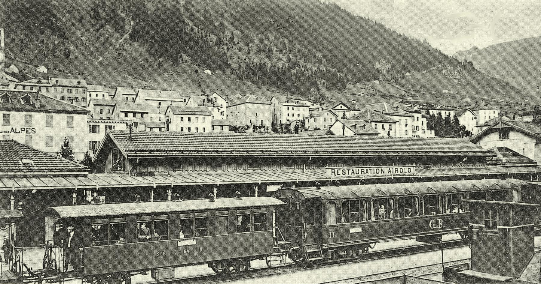 Schnellzug mit vierachsigem Wagen 2. Klasse B4ü der Gotthardbahn (GB) (rechts) und zweiachsigem Wagen 2. Klasse B der Schweizerischen Centralbahn (SCB) in Airolo. Die Gotthardbahn war den übrigen Schweizer und den meisten europäischen Bahngesellschaften punkto Komfort und exklusivem Wagenmaterial weit voraus. Zwischen den beiden Wagen von GB und SCB liegen schon rein äusserlich Welten – von der Innenaussatttung ganz zu schweigen. Während der GB-Vierachser dreiteilige Panoramafenster und elektrische Beleuchtung aufwies, besass der kleine Wagen der SCB nur bescheidene Fensterchen und russende Petroleumlampen.